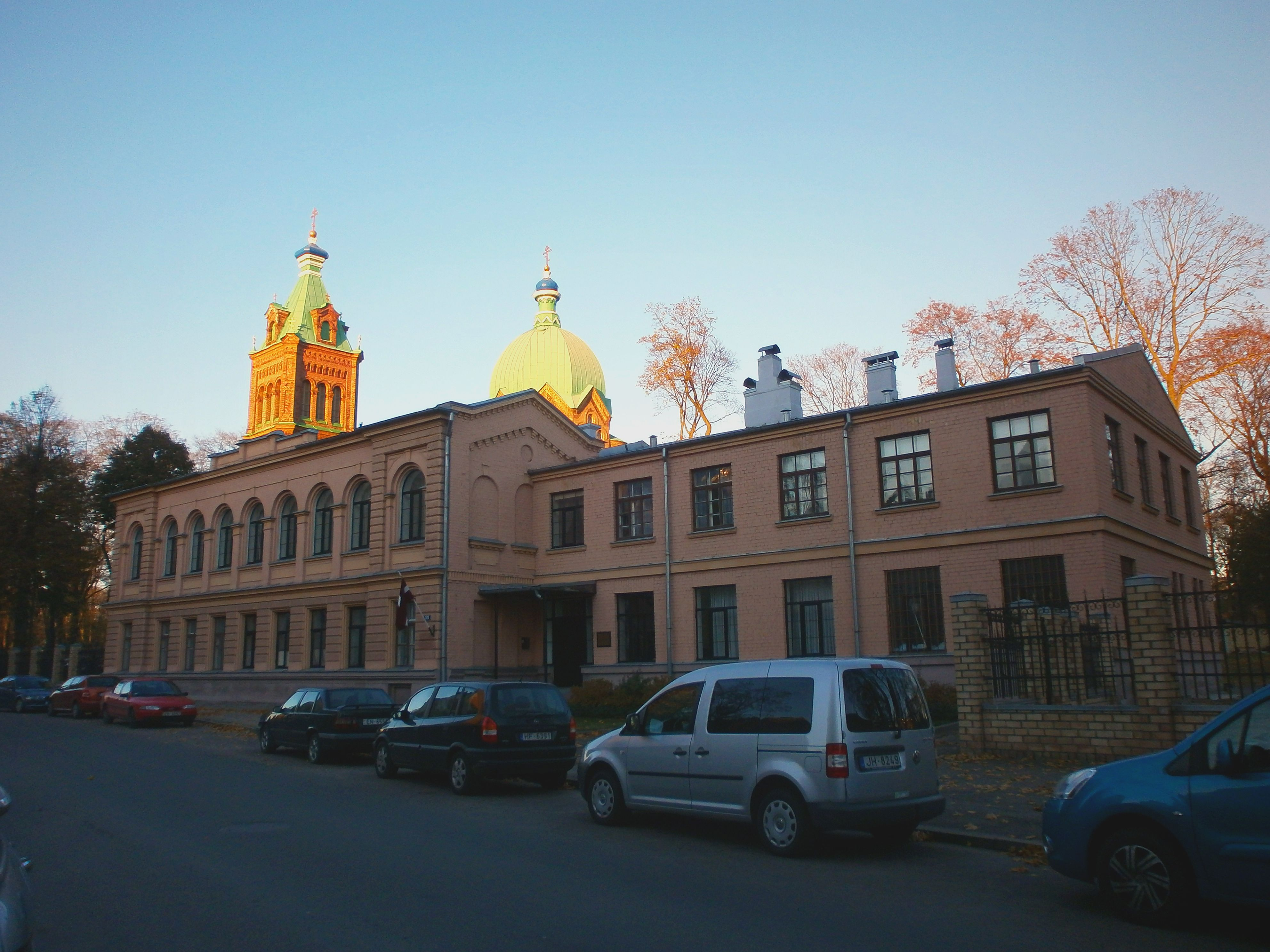 Rīgas Pareizticīgo garīgais seminārs.